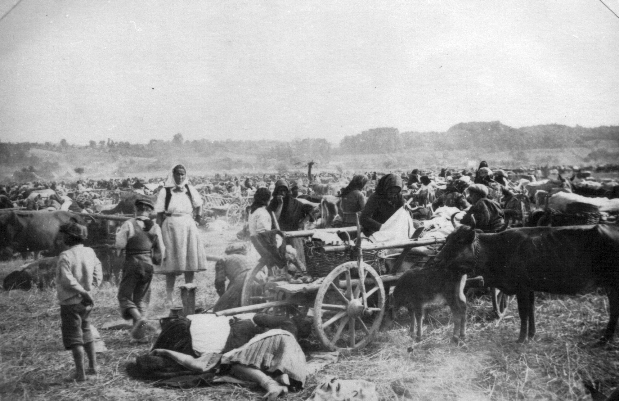 Srpskohrvatski / српскохрватски: Narod i vojska u zbegu na Kozari 1942.